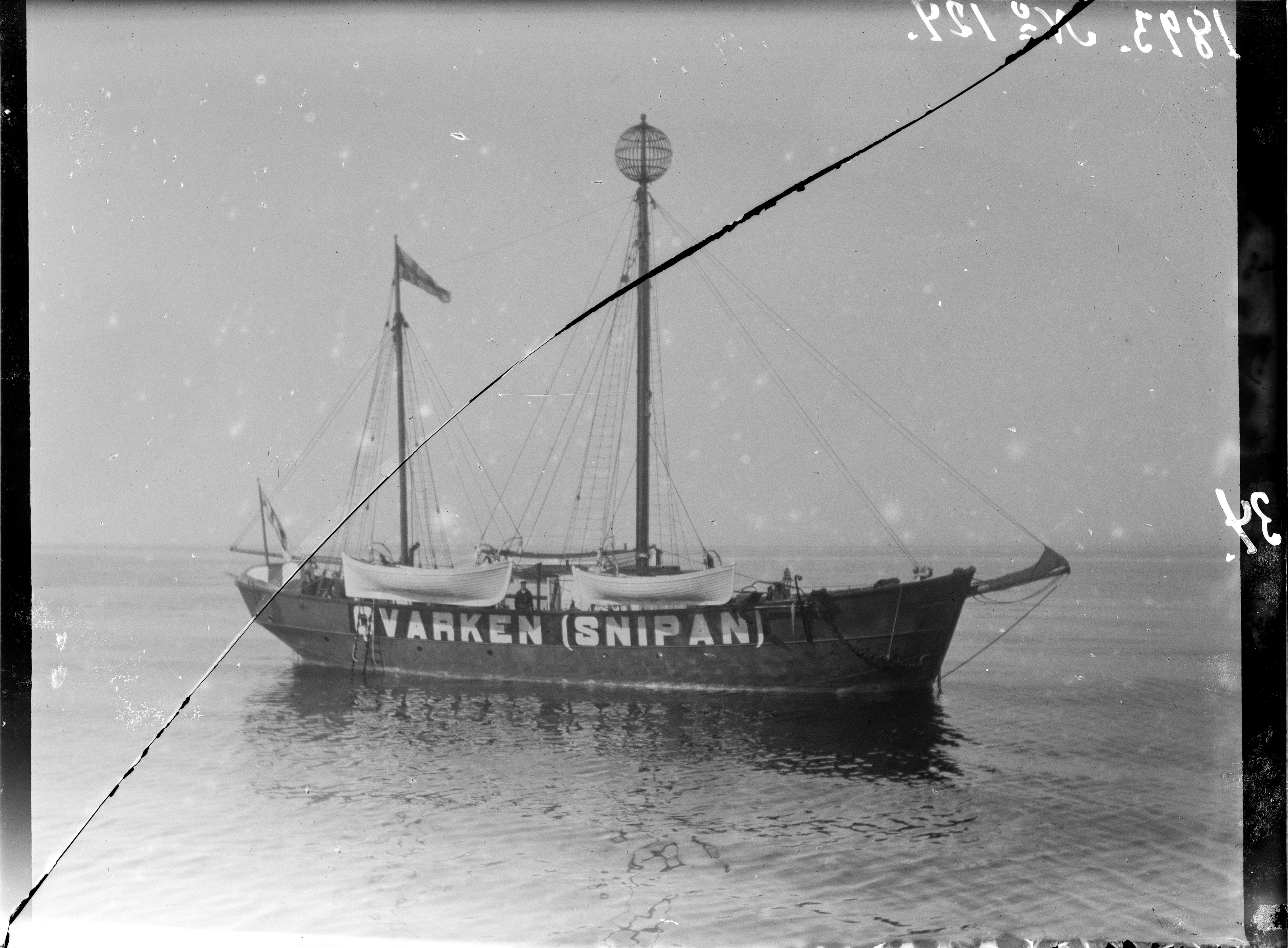 Majakkalaiva Snipan merellä ilmeisesti vuonna 1893.